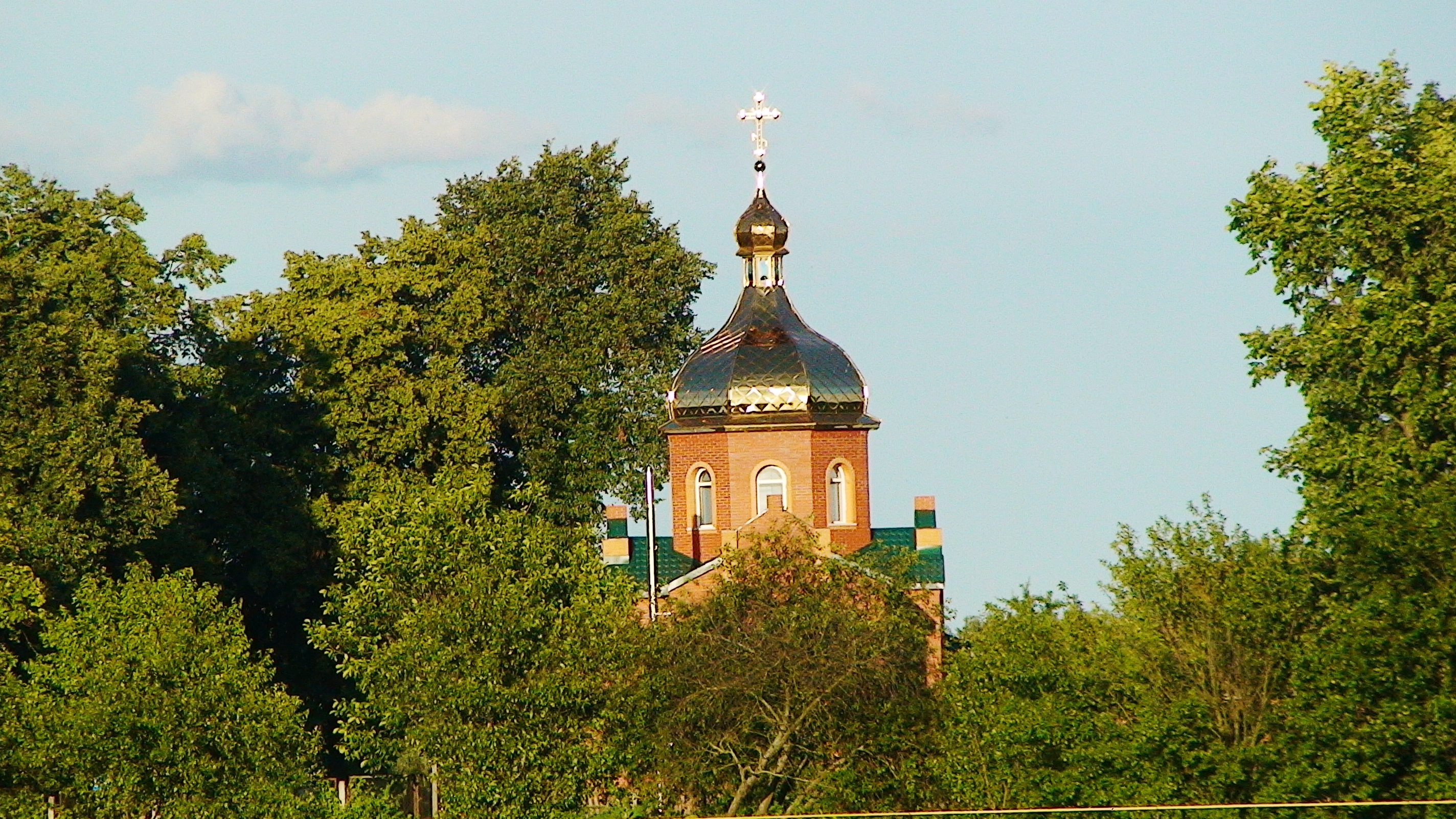 Вид на церковь